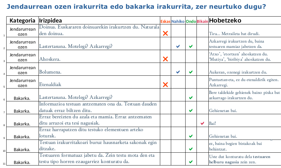 Ikasle batek irakurtzerakoan erakusten duen gaitasuna ebaluatzen duen errubrika bat